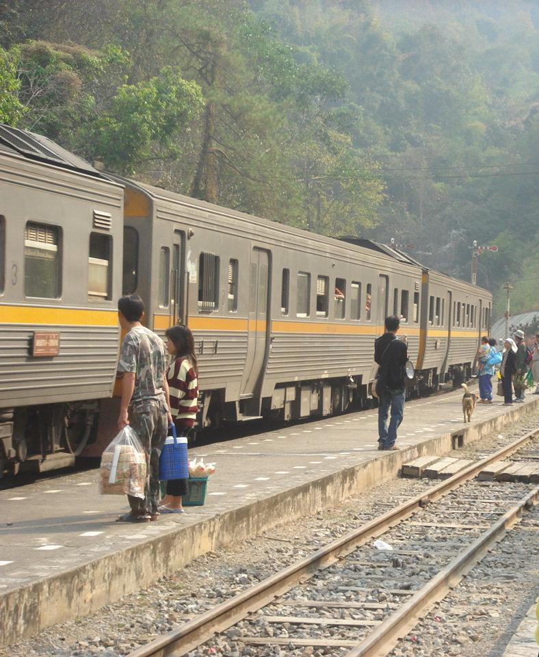 ขบวนรถไฟ ที่จอดที่สถานีรถไฟขุนตาน สถานีรถไฟขุนตาน ตั้งอยู่ที่ตำบลทาปลาดุก อำเภอแม่ทา จังหวัดลำพูน